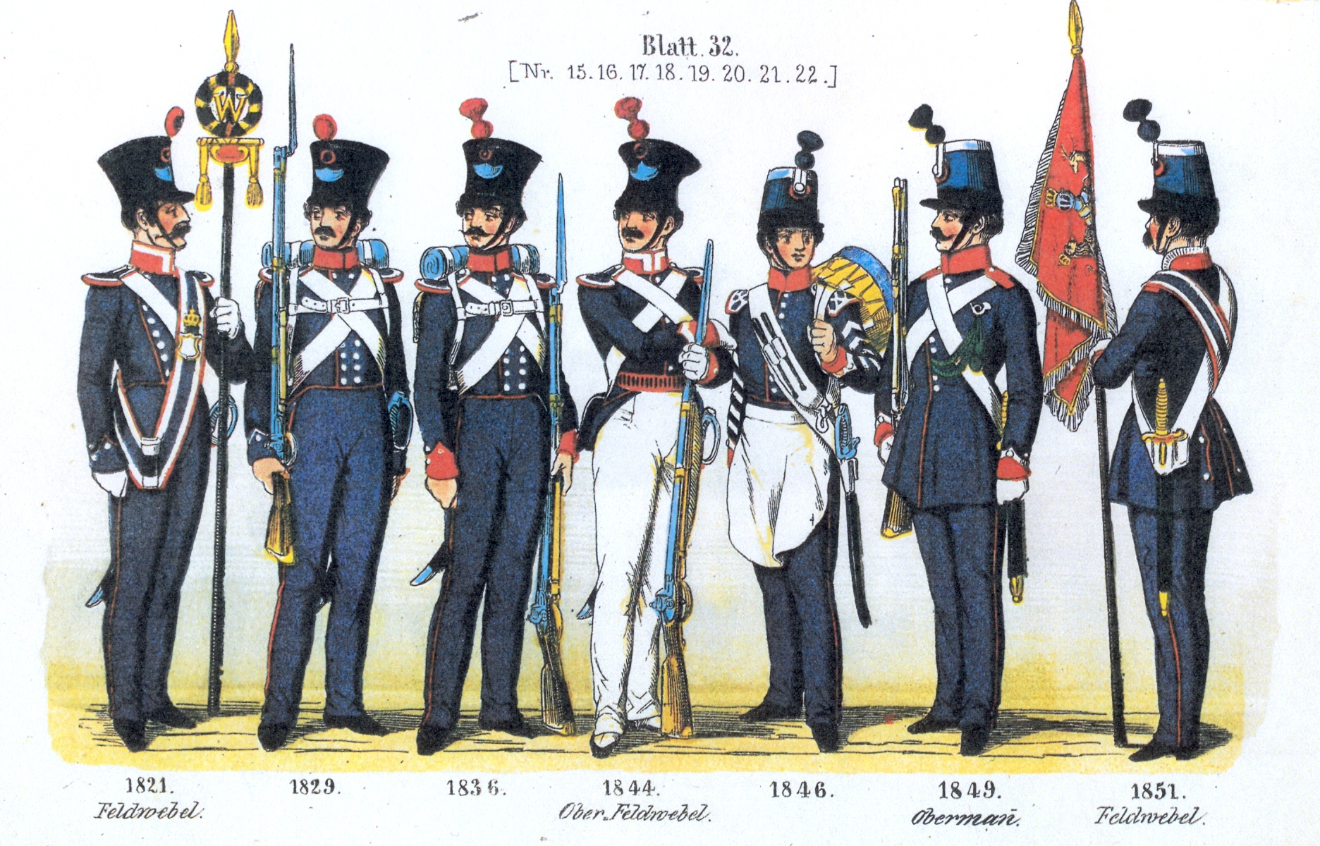 Blatt 32: Diverse der Infanterie-Regimenter